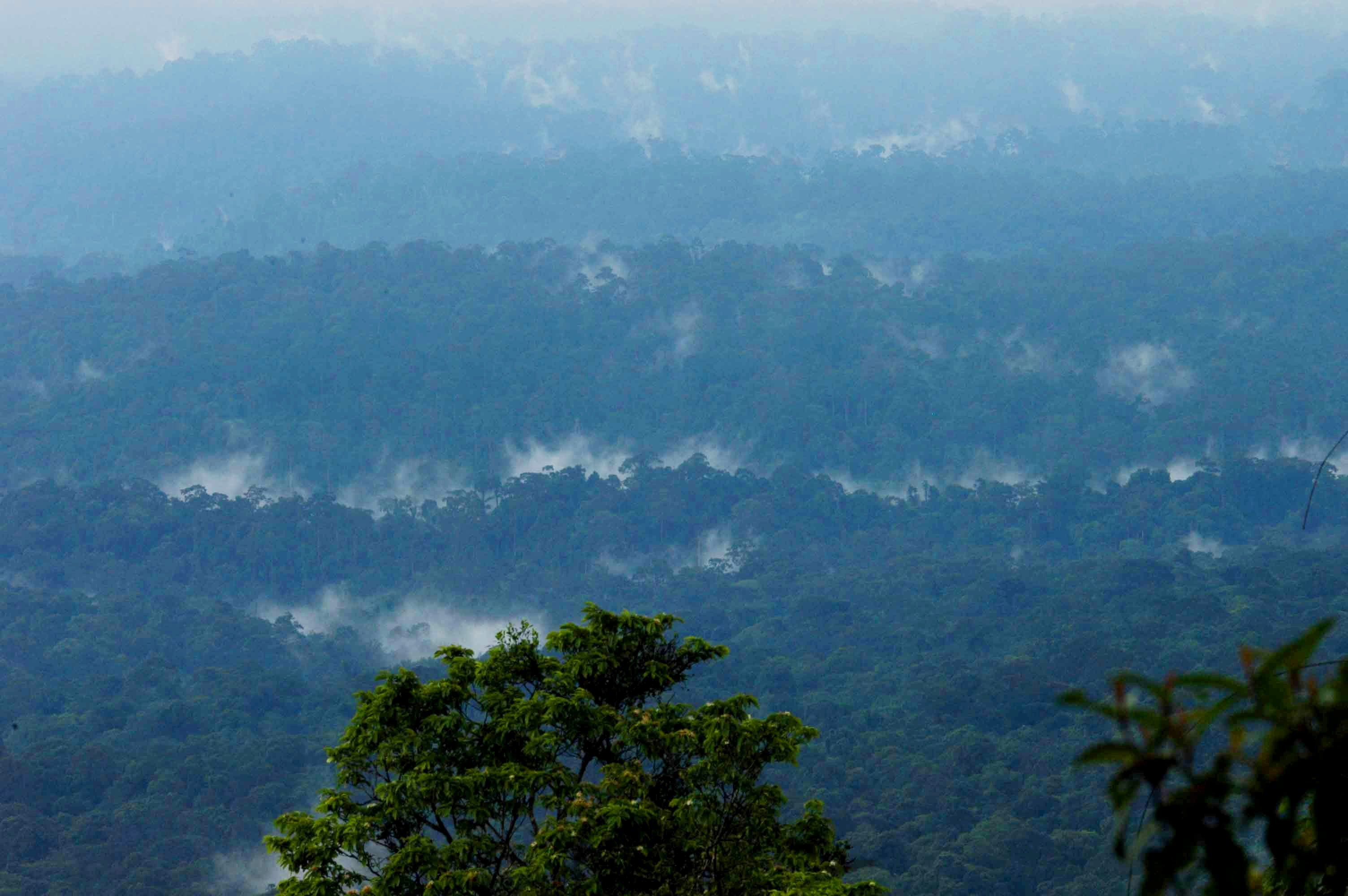 Wolkkondensasie in Khao jai se tropiese reënwoud, Thailand